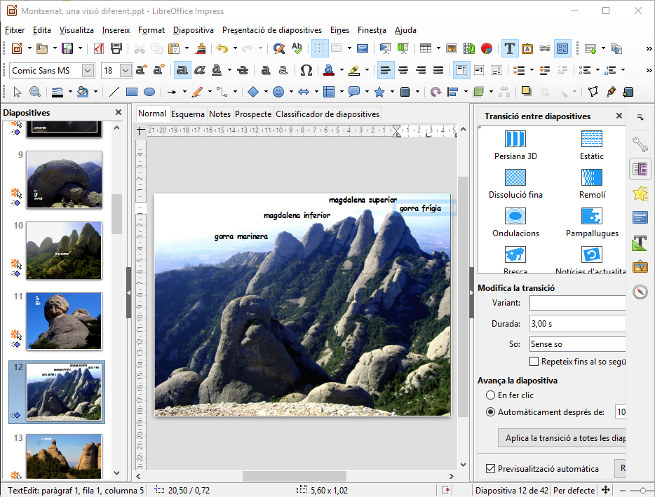 Impress de LibreOffice 5.2